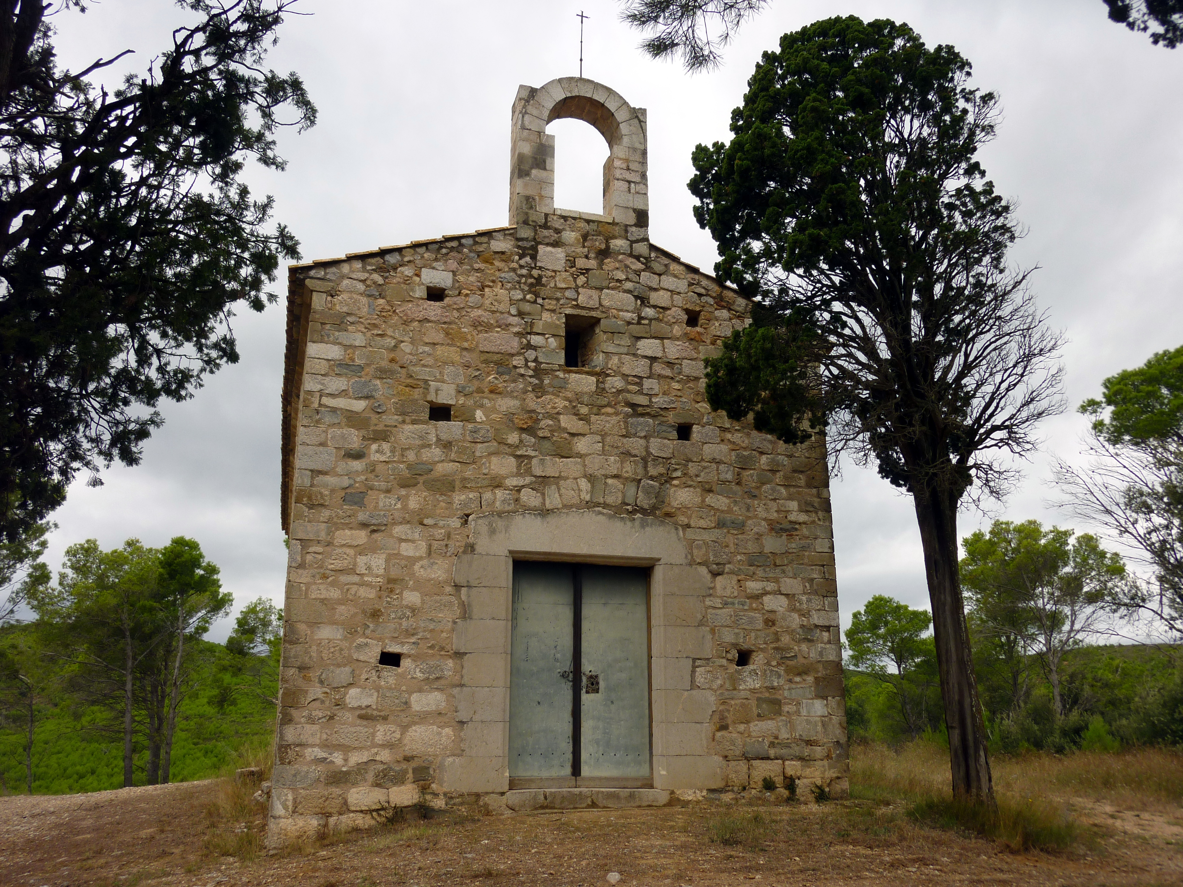 Façana oriental de la capella de Sant Grau (Albons). Edifici de planta rectangular de caràcter romànic, fou modificat el 1753 com testimonia la data a la llinda de la porta oriental.